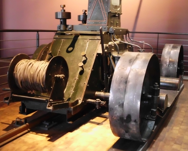 Elektrische Treidellok (1898) am Finowkanal (System Siemens Halske) im Berliner Technikmuseum